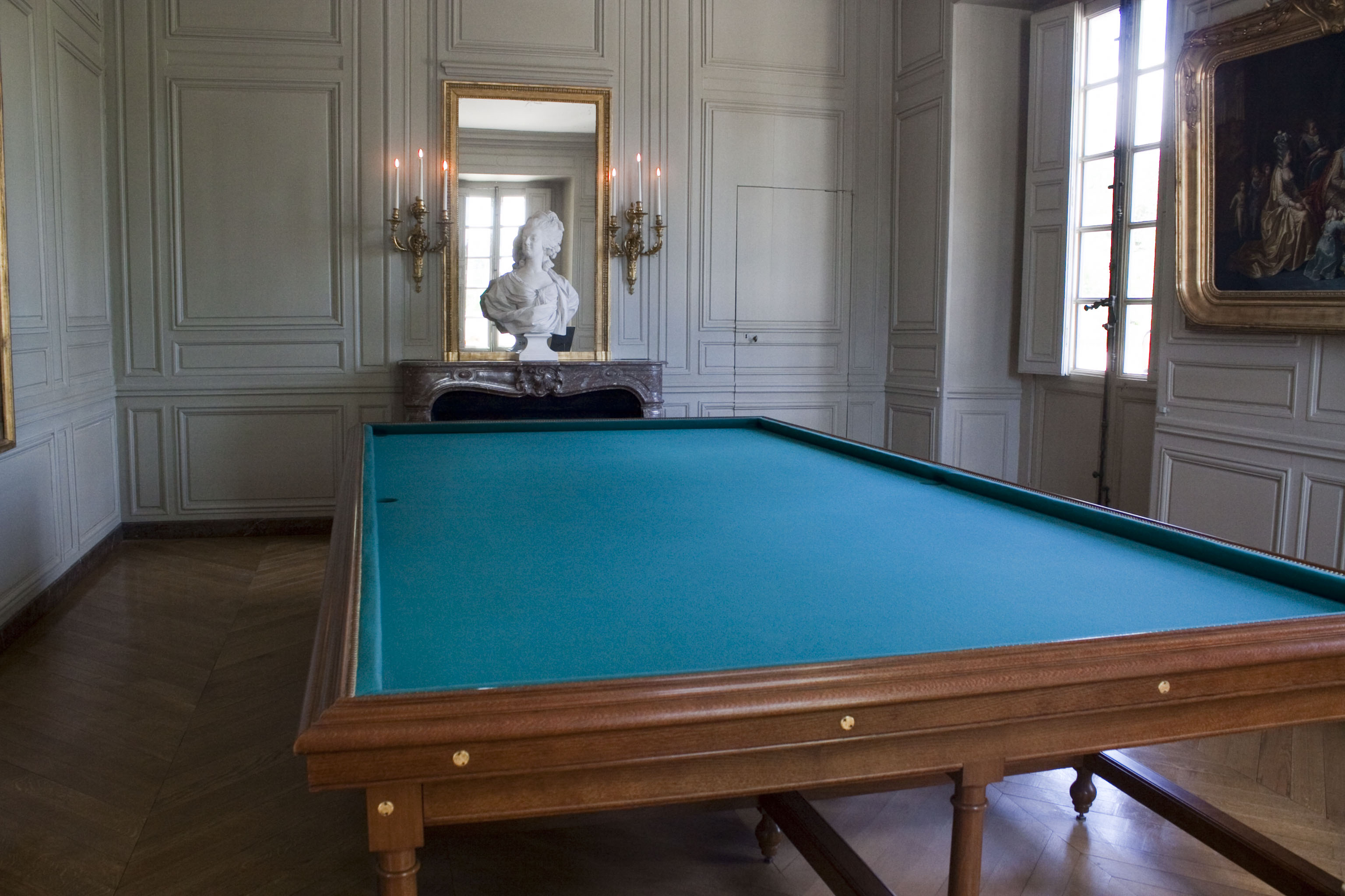 Billard situé dans la salle de billard au rez-de-chaussé du Petit Trianon, château de Versailles.